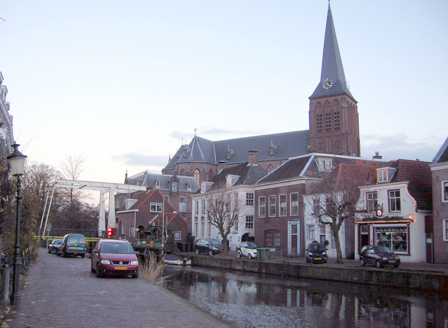 Schippersgracht, Maarssen(-dorp), Nederland. Schippersgracht, Maarssen, the Netherlands.